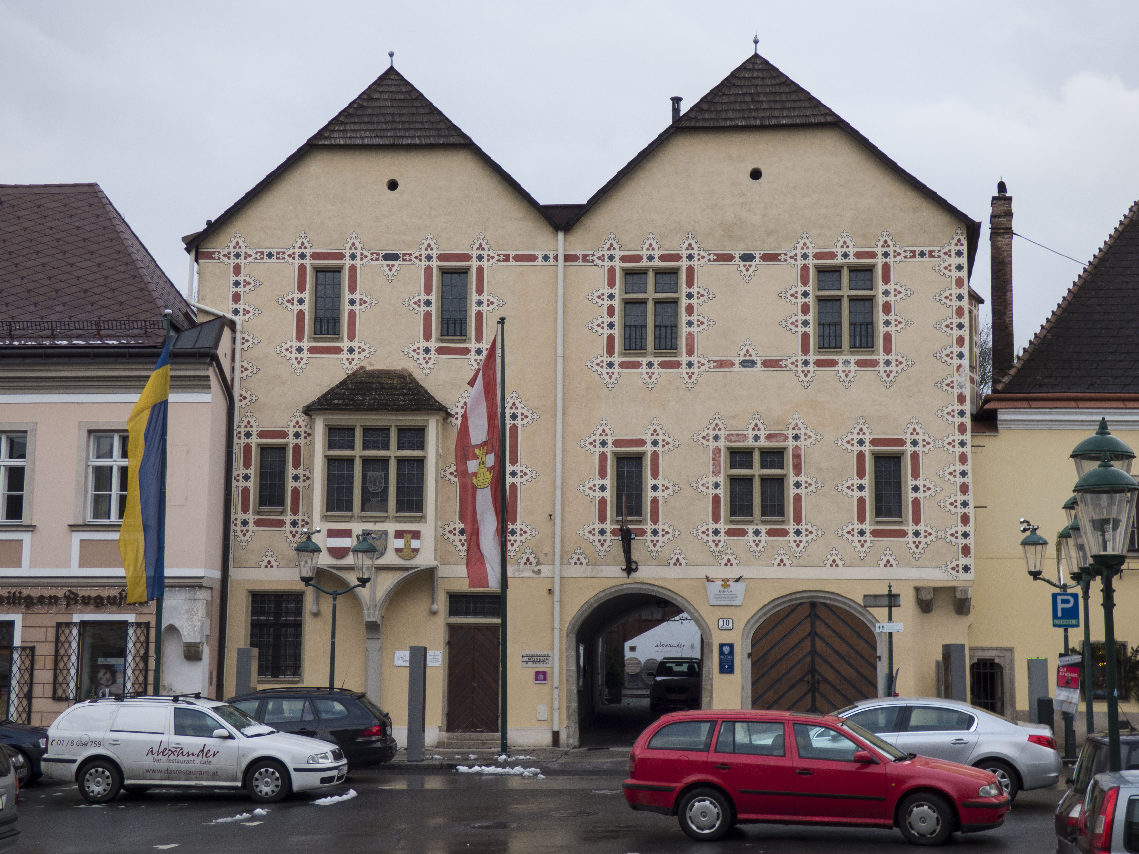 Das Rathaus in Perchtoldsdorf befindet sich am Marktplatz 10.